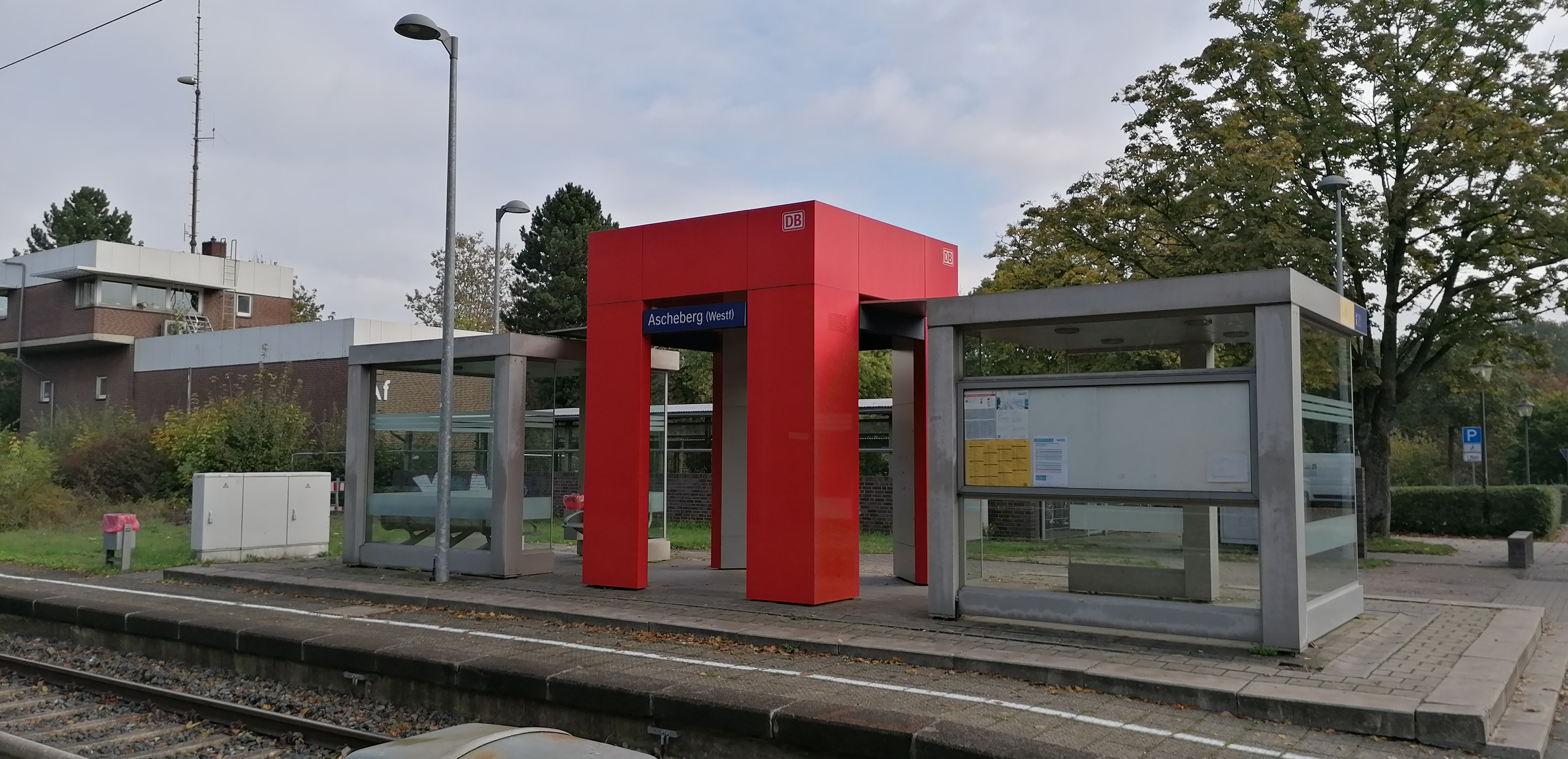 Bahnhof Ascheberg (Westfalen), Nach der Übernahme der Linie RB50 durch die Eurobahn hat die Deutsche Bahn hier die Fahrkartenautomaten abgebaut. Taken on 3 October 2019